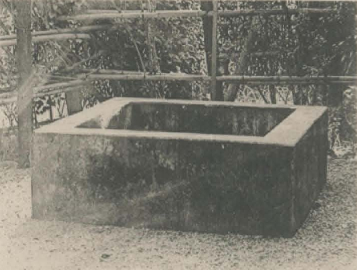 中文（台灣）: 位於台北市南菜園外的井